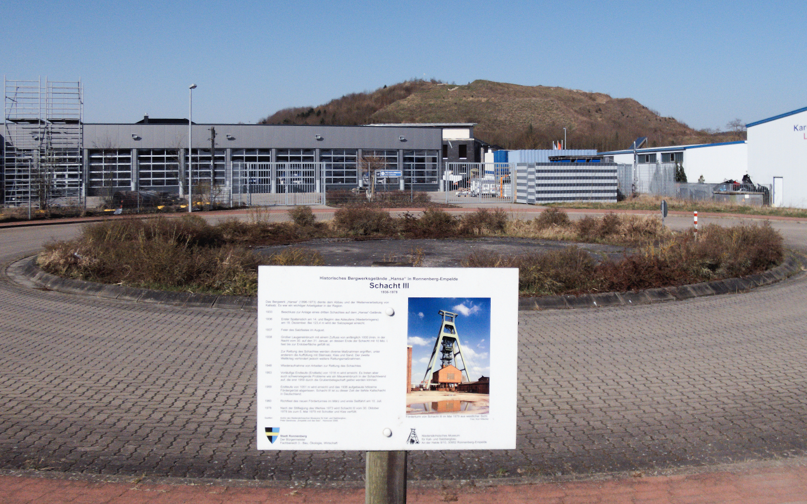 Schachtdeckel des Schacht III des Kaliwerks Hansa. Im Hintergrund die begrünte Abraumhalde. Im Vordergrund eine Infotafel des Niedersächsischen Museum für Kali- und Salzbergbau dazu.